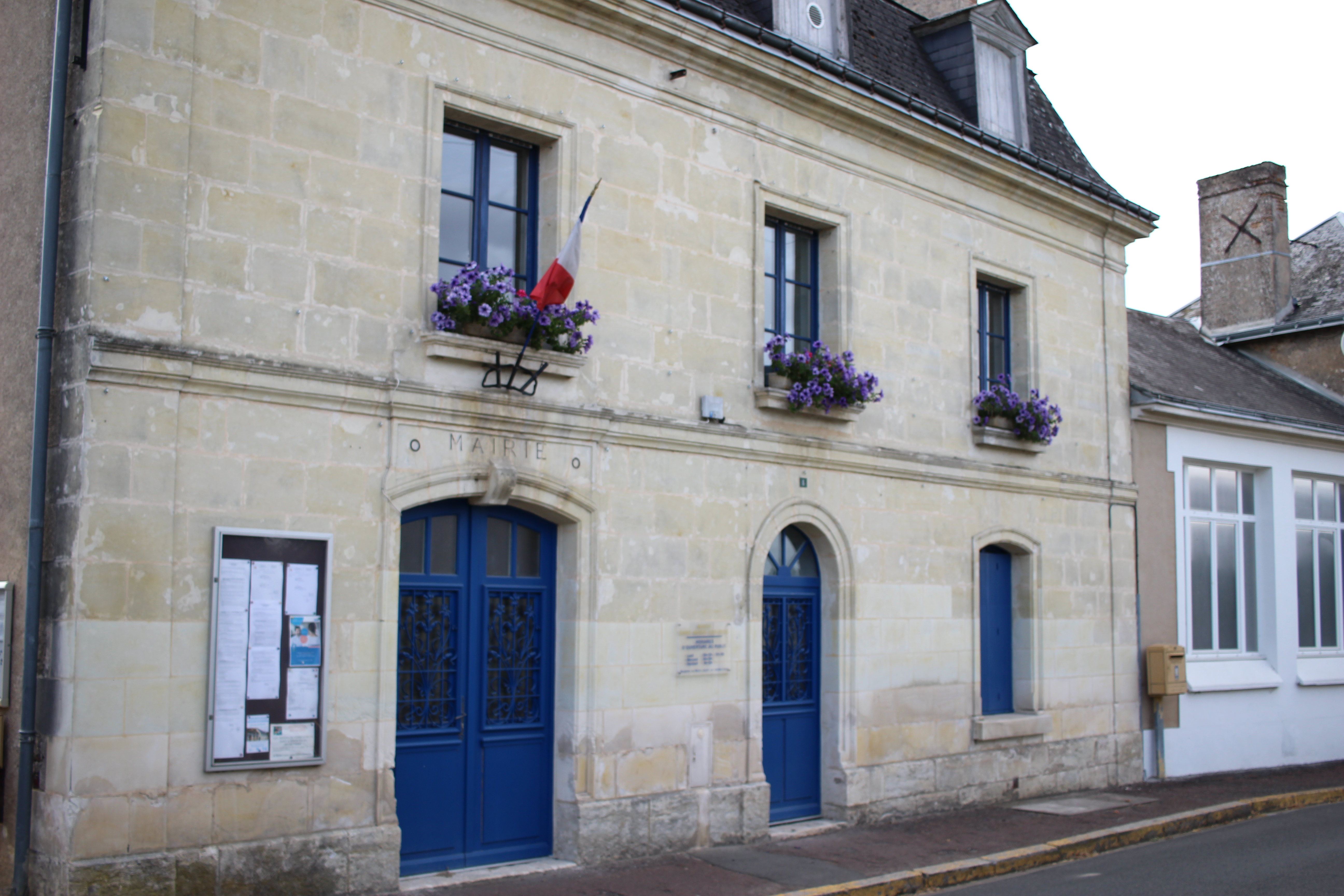 La mairie de Dame-marie-les-Bois. au fond, après la boite aux lettres, se trouve une classe de l'école élémentaire du village.